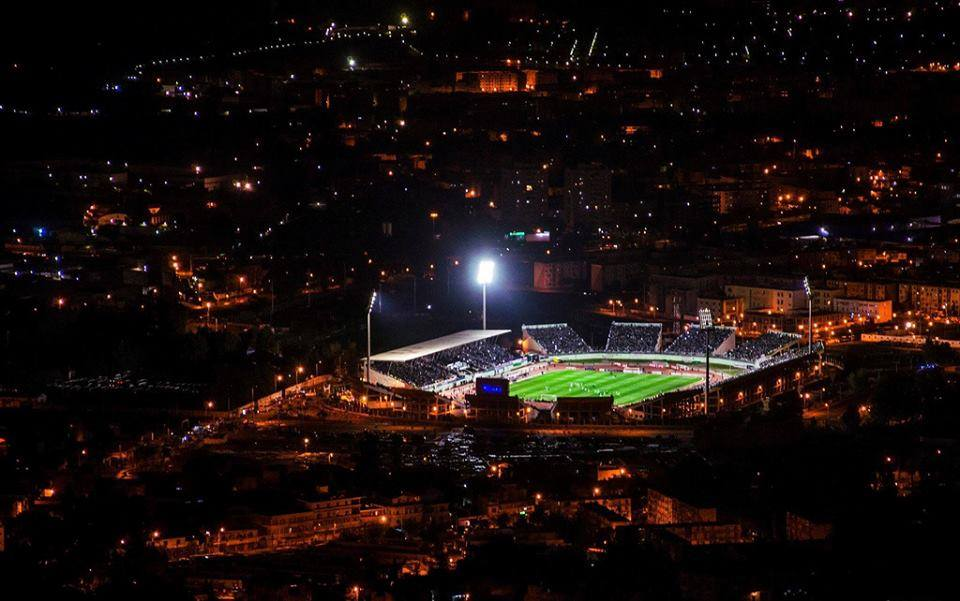 Enceinte du stade Chahid Mustapha Tchaker durant le match international de football entre la sélection algérienne et son homologue éthiopienne comptant pour les qualifications de la coupe d'Afrique des nations 2017.